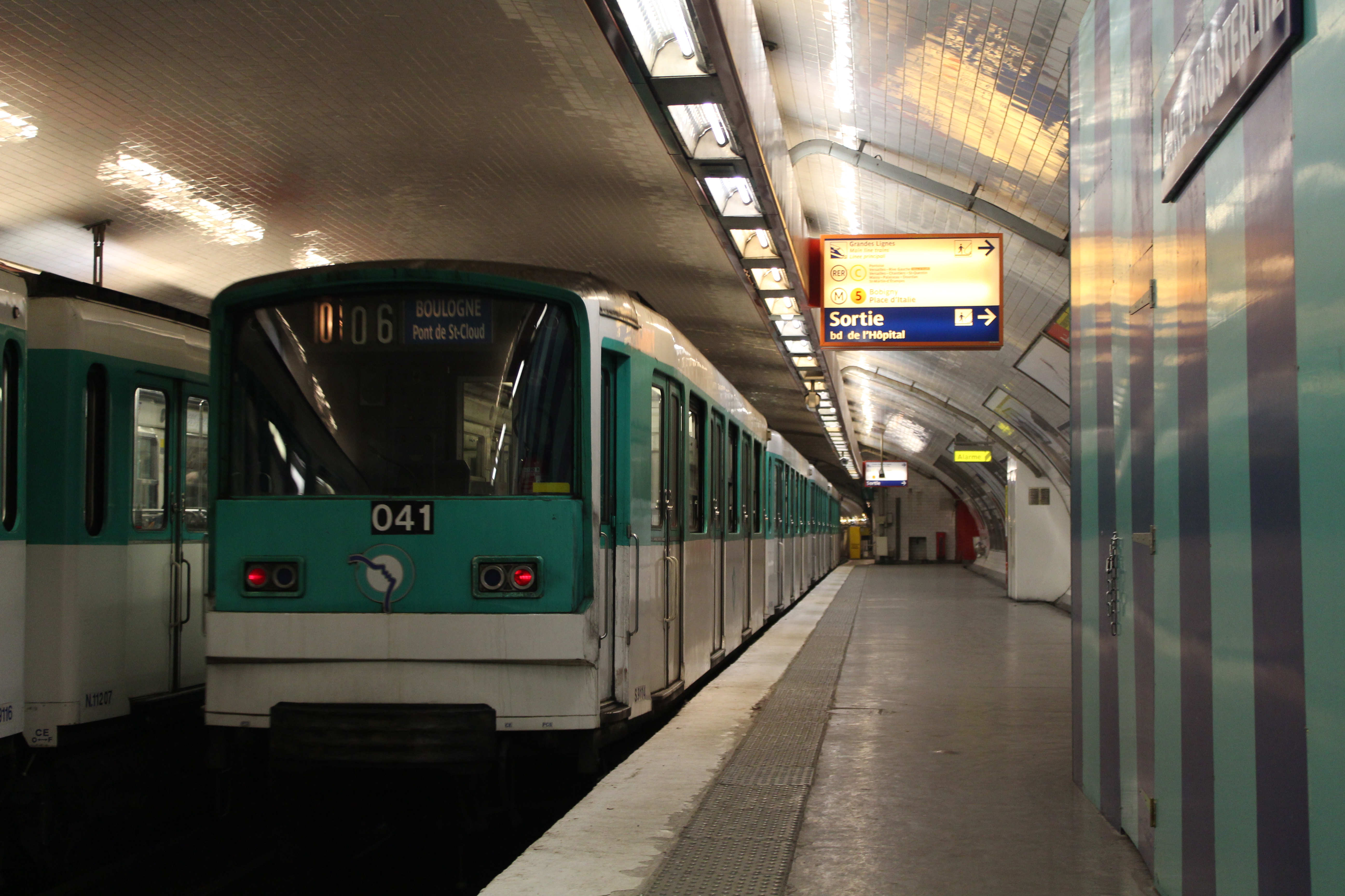 Rame MF67 D n°2 041 à la station de métro Gare d'Austerlitz de la ligne 10 du métro de Paris.